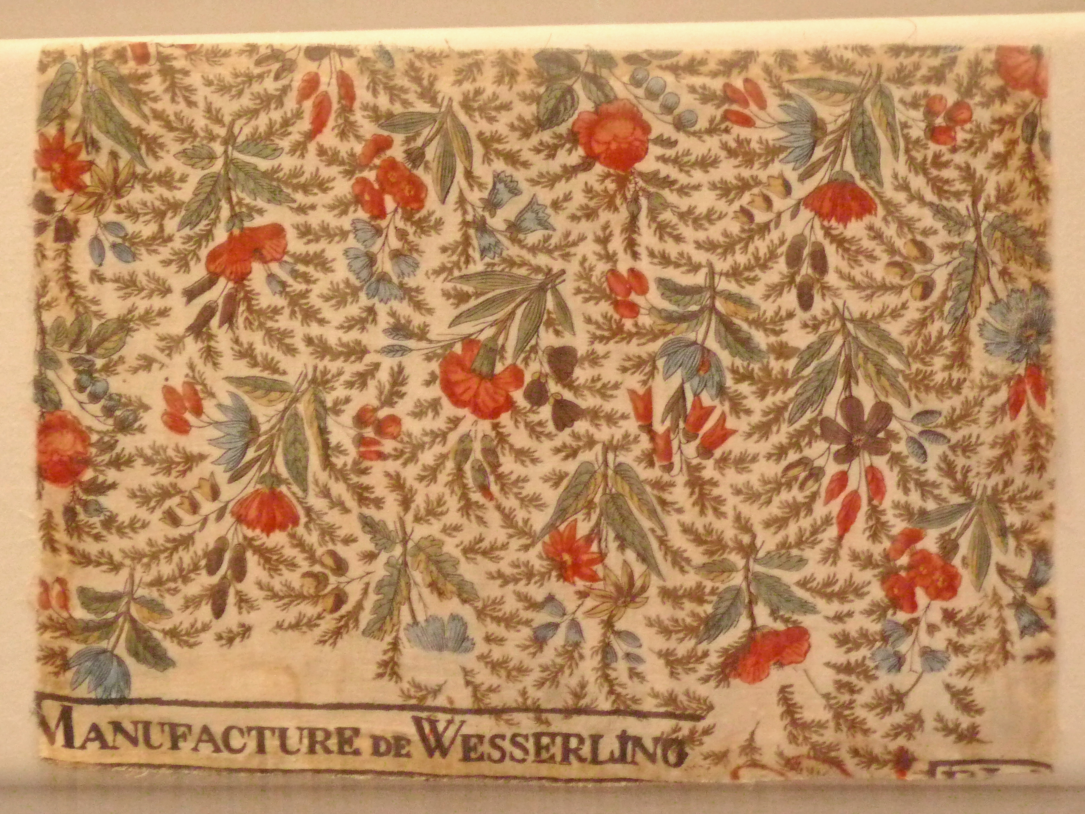 Musée de l'impression sur étoffes (Mulhouse) : échantillon à motif de fleurs, manufacture de Wesserling, fin du 18e siècle, toile de coton imprimée à la planche